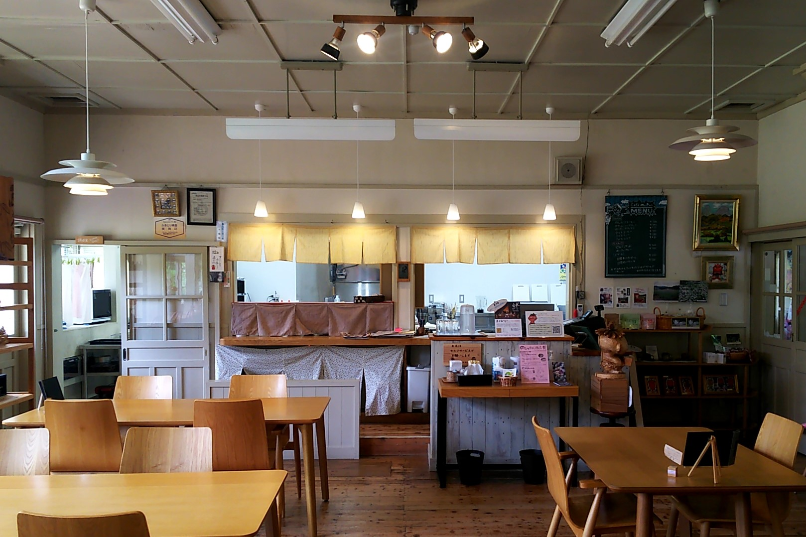 愛知県北設楽郡東栄町にある「のき山学校」。カフェ「Caféのっきぃ」。